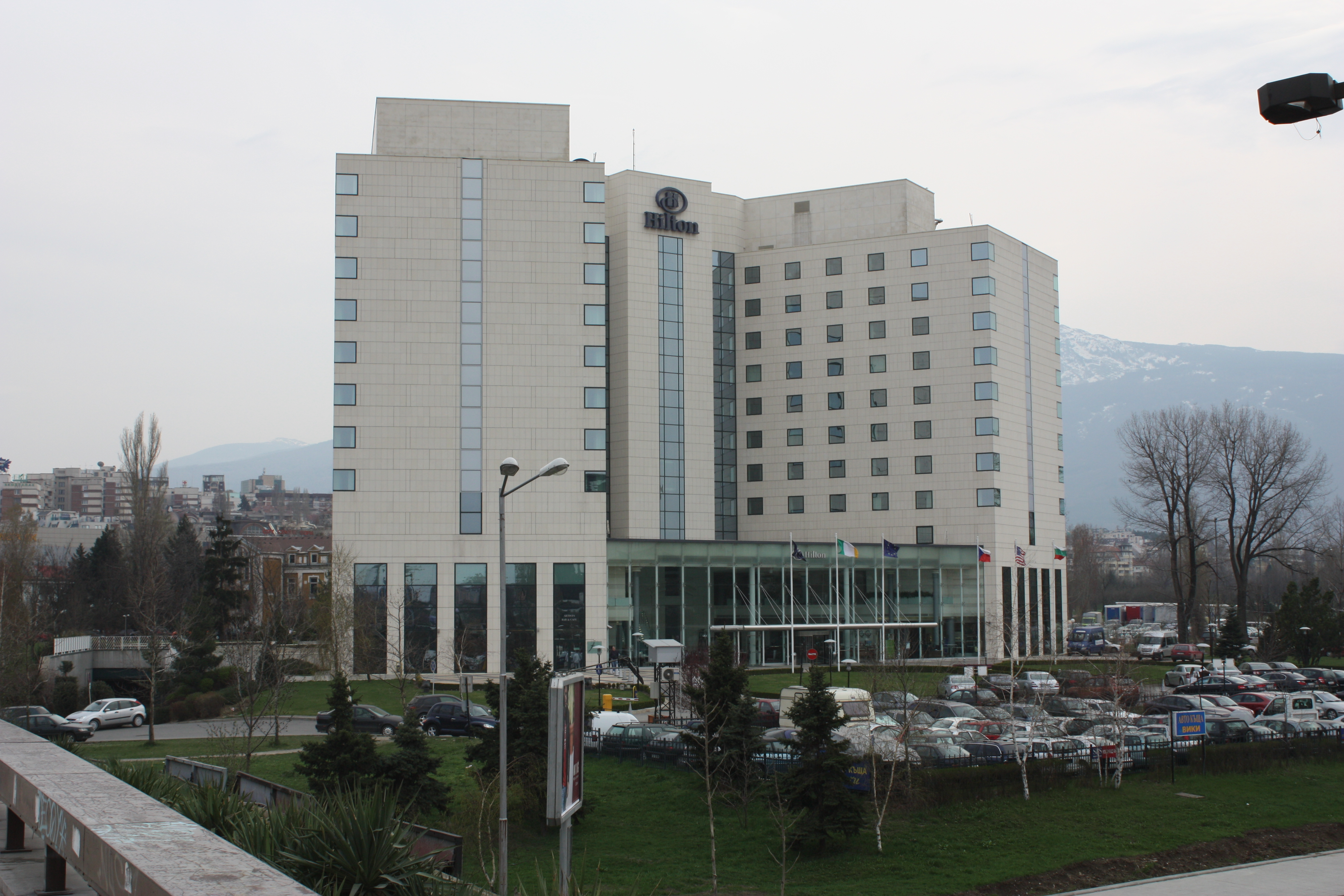 National Palace of Culture (Bulgaria), Sofia, Bulgaria